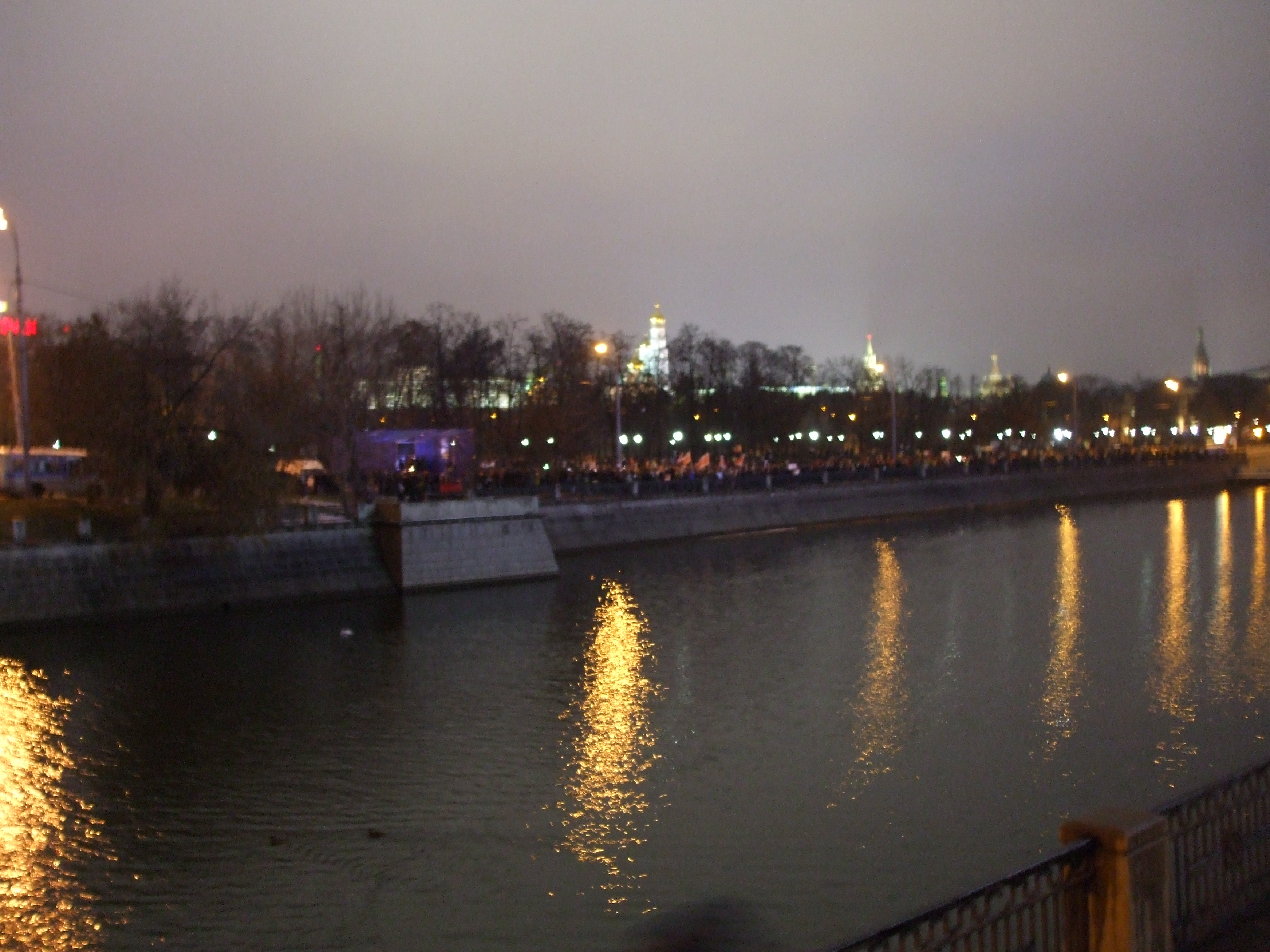 Конец митинга на Болотной площади 10 декабря 2011